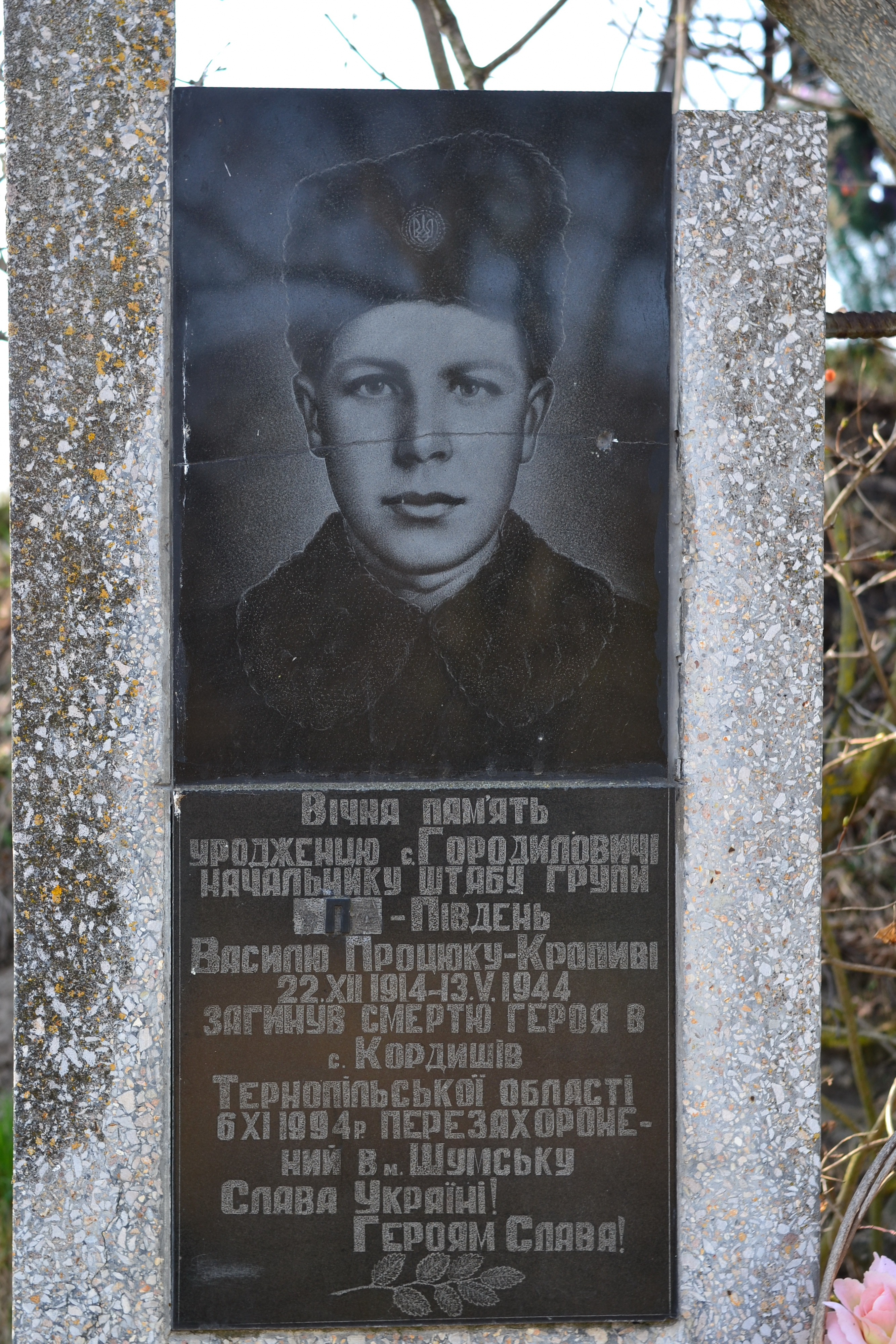 Пам'ятник Процюку В., «Кропиві», начальнику штабу УПА-Південь (граніт) (1995 рік) - детально - Городиловичі (поблизу каплиці) Сокальський район Львівська область Україна